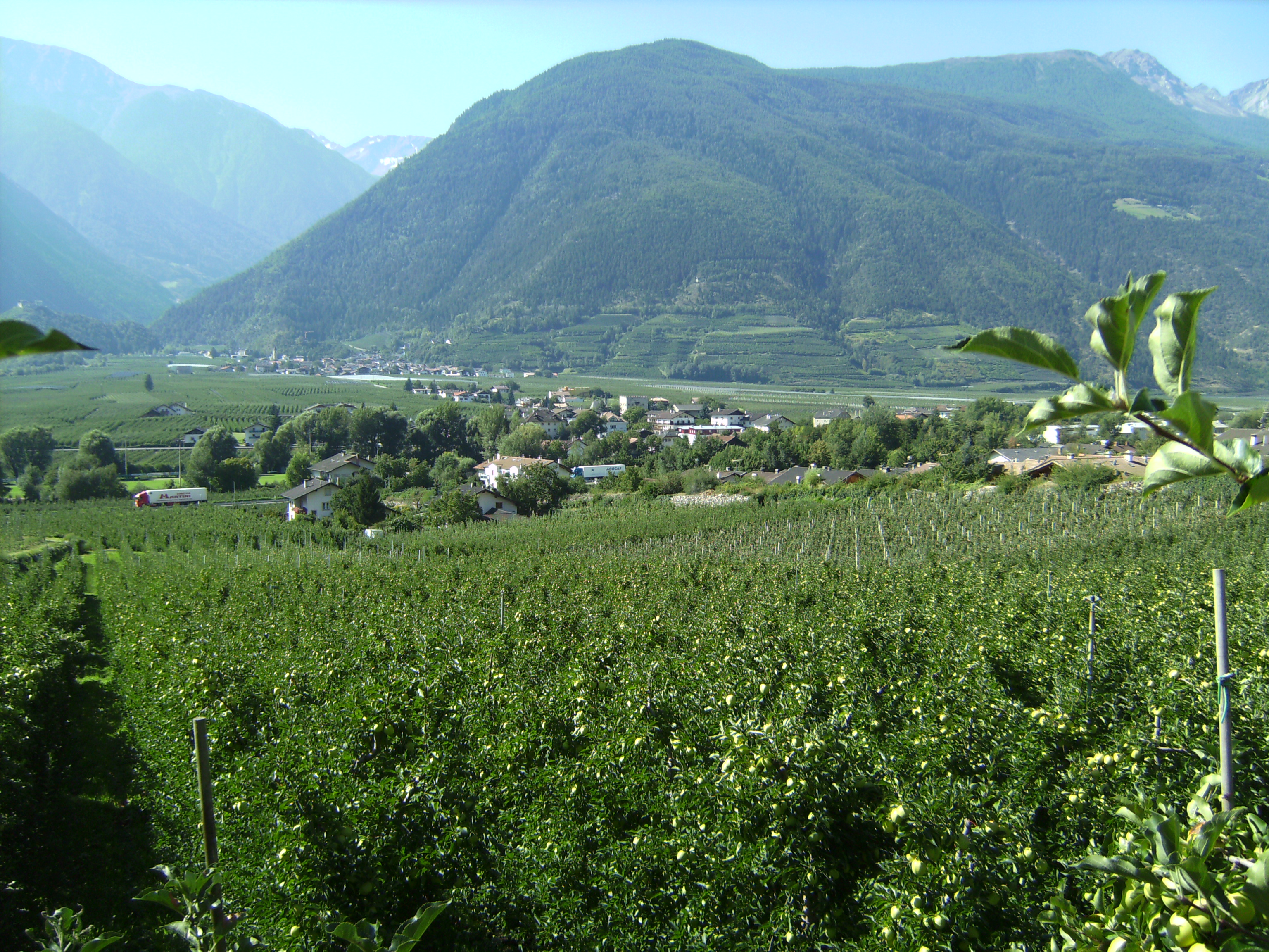 Ansicht von Goldrain